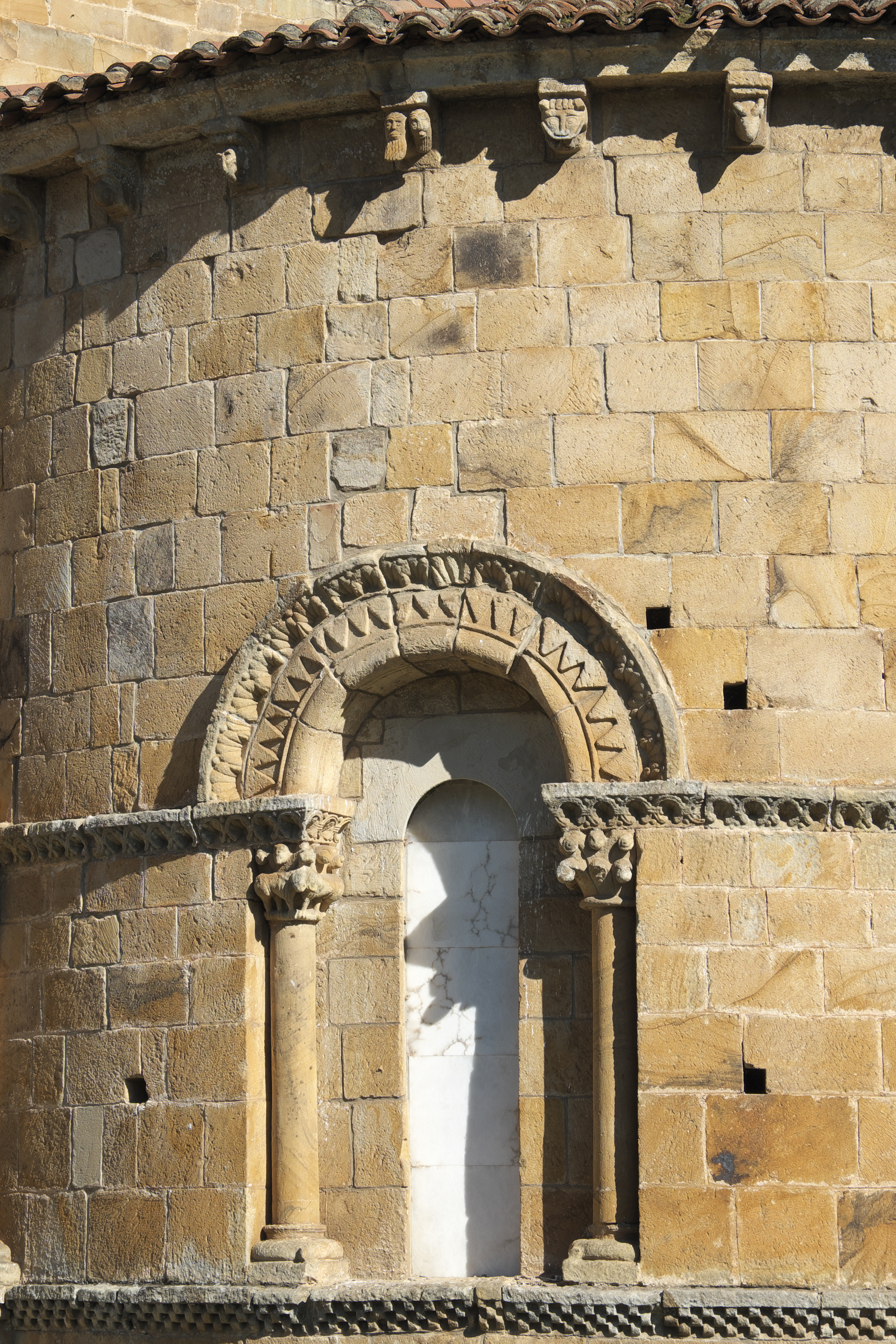 Ehemalige Benediktinerklosterkirche Colegiata de Santa Cruz in Castañeda in Kantabrien (Spanien), Apsisfenster